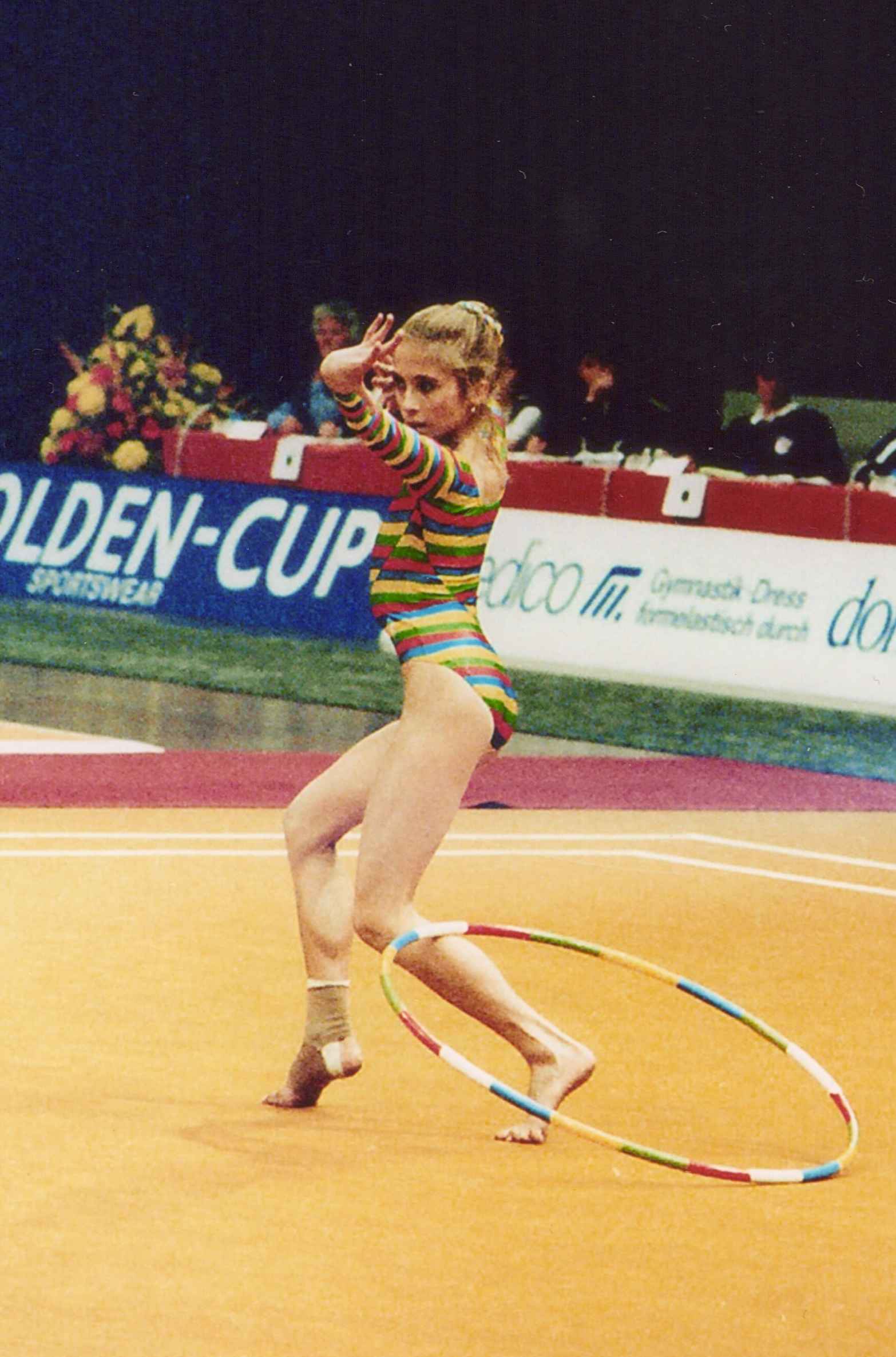 La gimnasta española Marta Bobo en el Campeonato Europeo de Gimnasia Rítmica de 1984 en Viena.